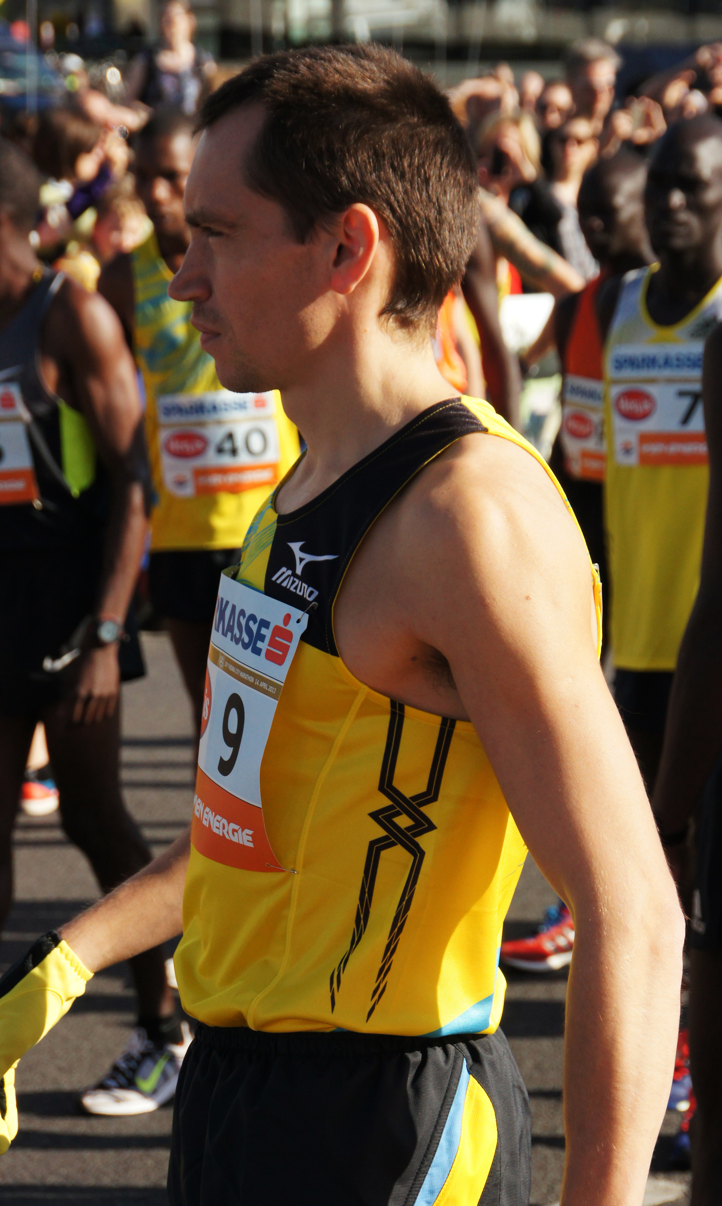 Vienna 2013-04-14 Vienna City Marathon - 9 Aleksey Vladimirovich Sokolov